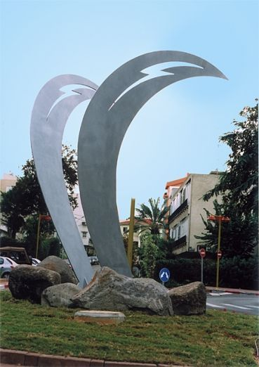 פסל מחווה לאלירן, כיכר קראוזה, חולון